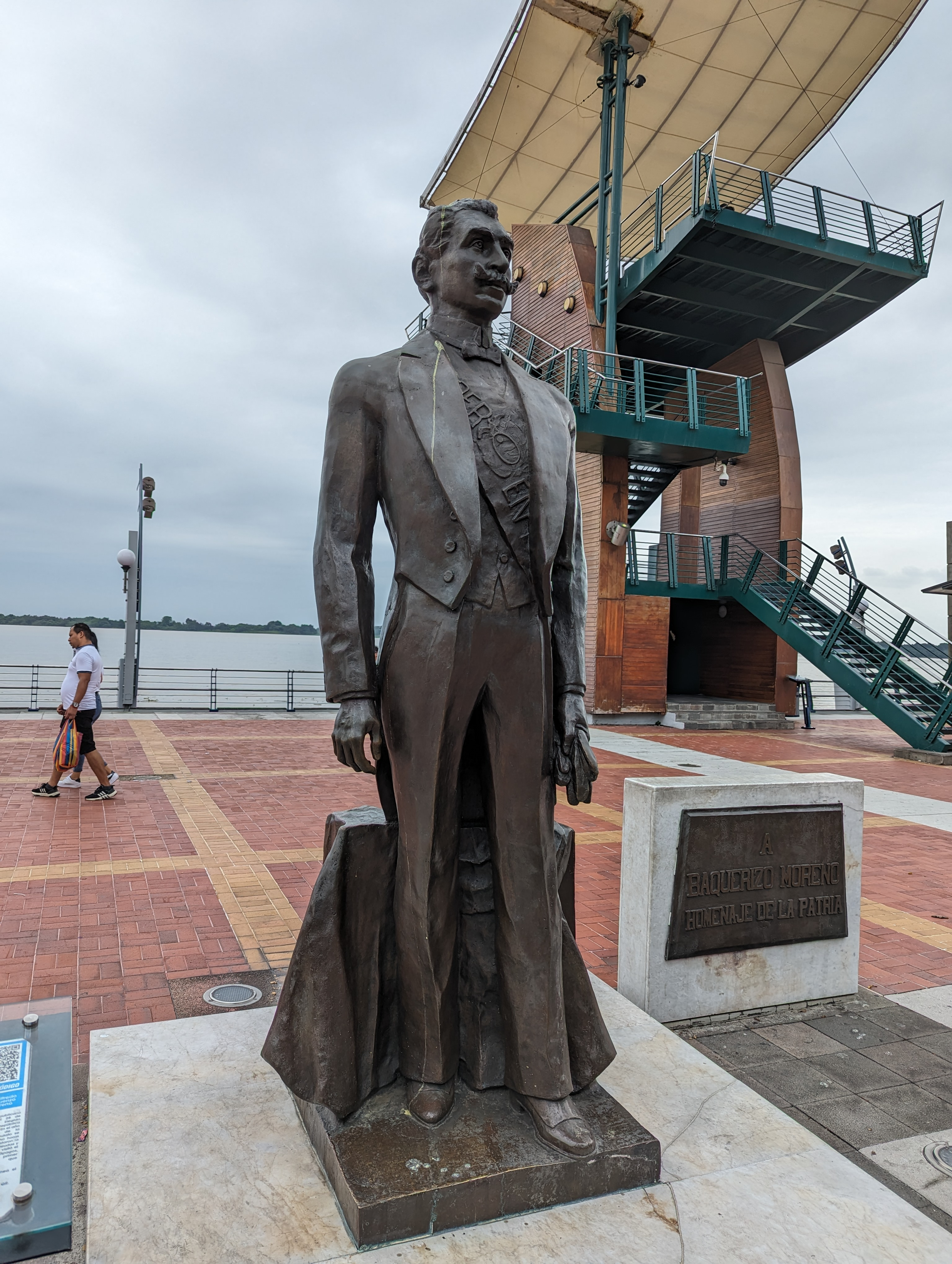 Monumento de Baquerizo Moreno en el Malecon 2000.